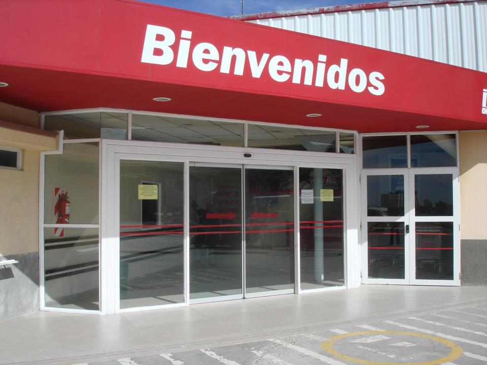 casa central